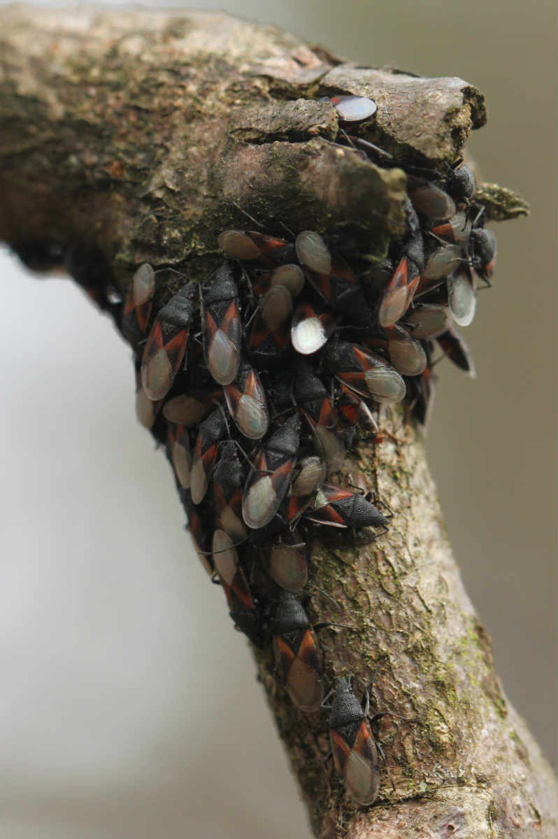 Überwinternde Lindenwanzen (Oxycarenus lavaterae), am 11.2.2017 in der Schwetzinger Hardt